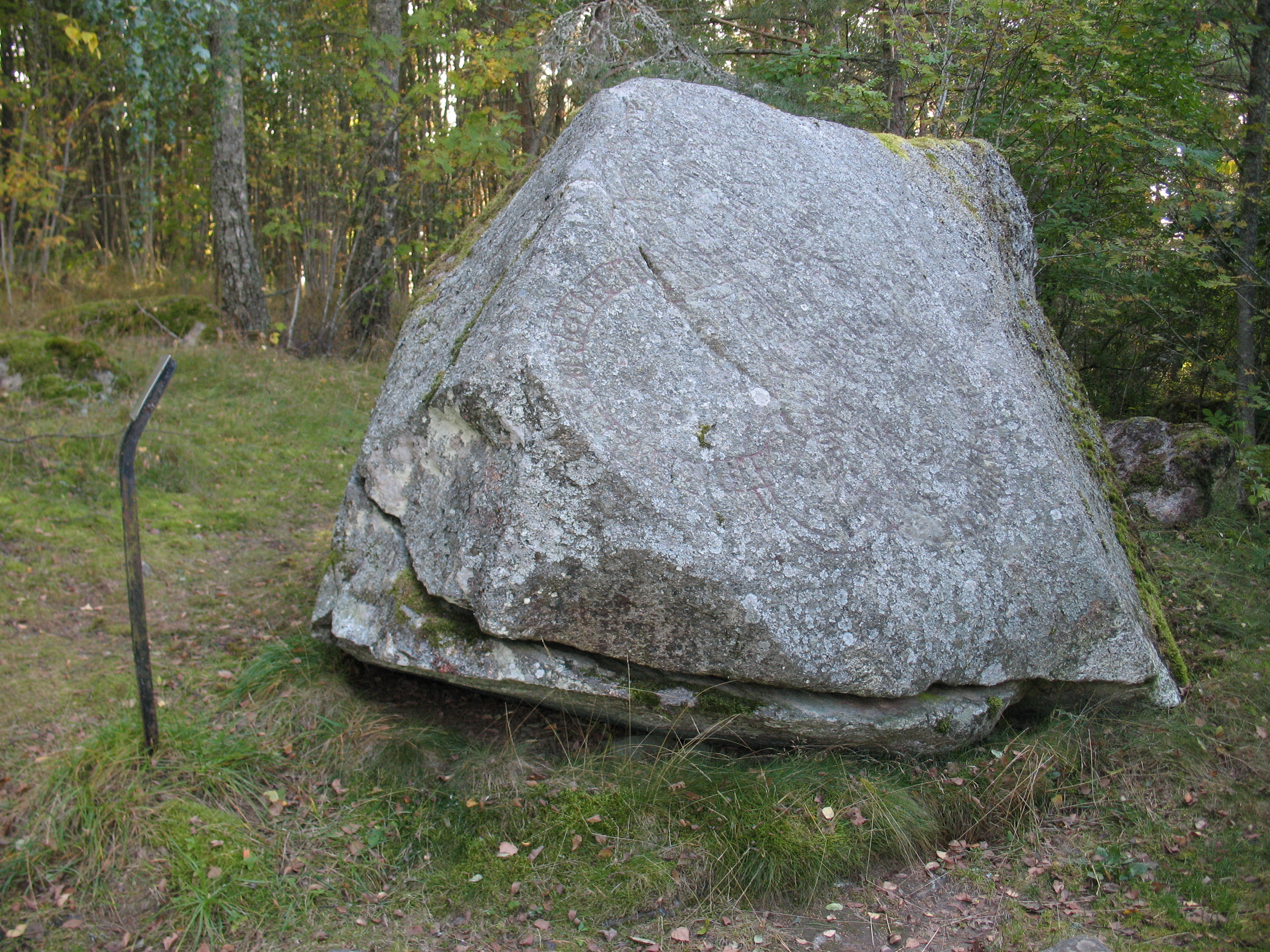 runestone